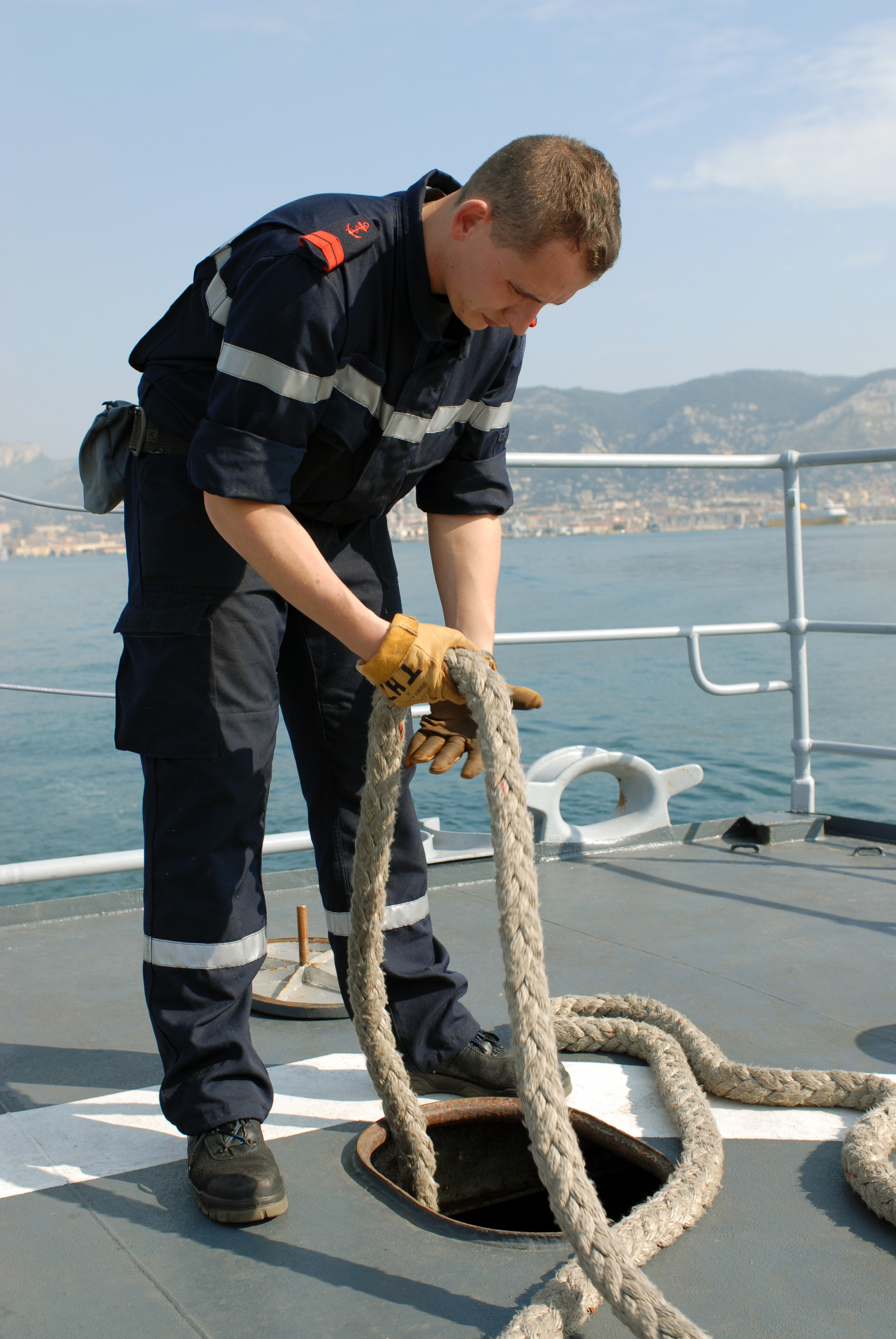 Un quartier-maître / manœuvrier / bosco.